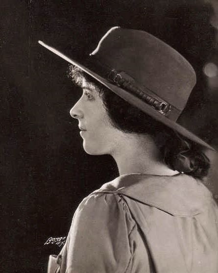 Edna Goodrich